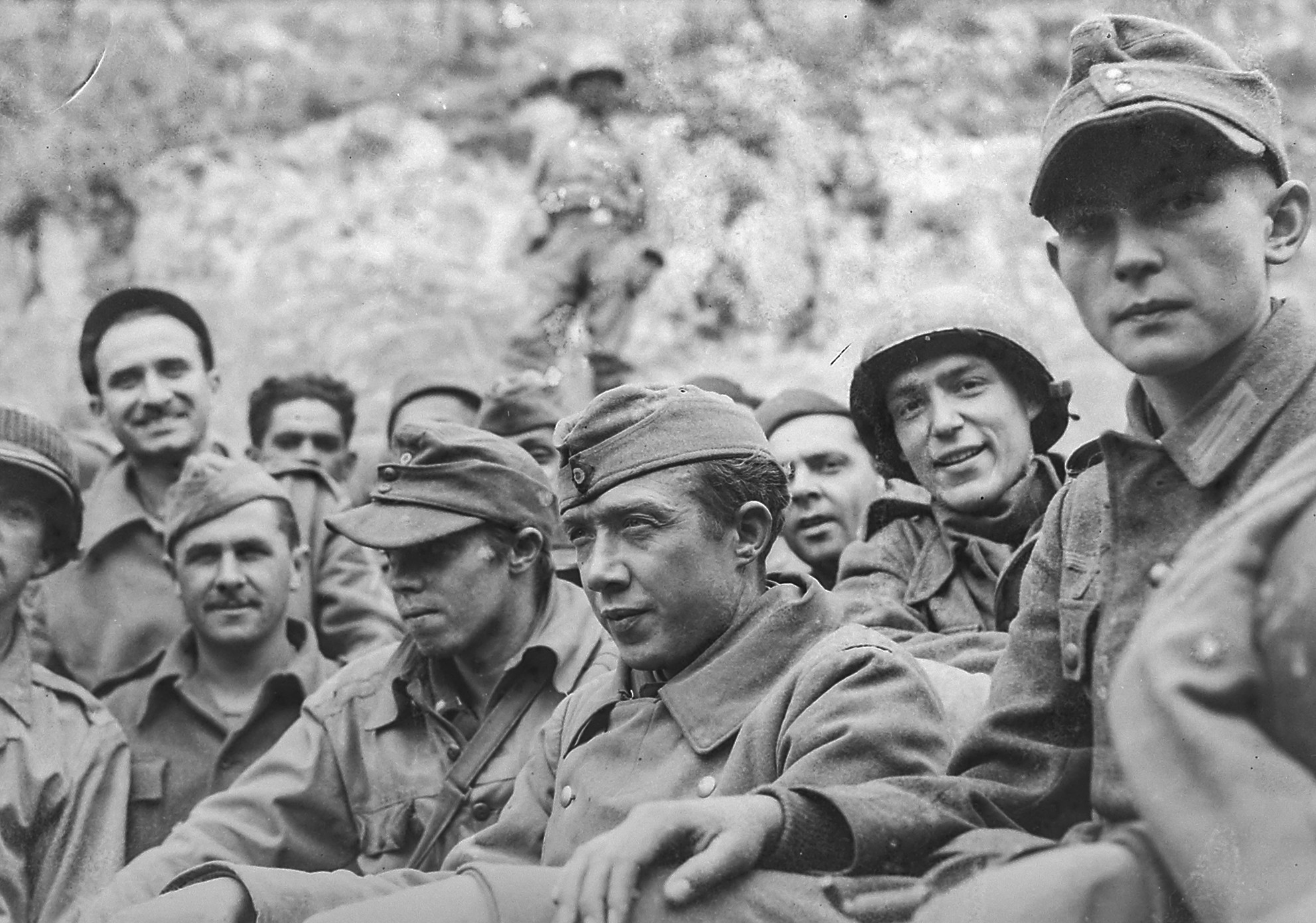 Imagem do Fundo Agência Nacional.